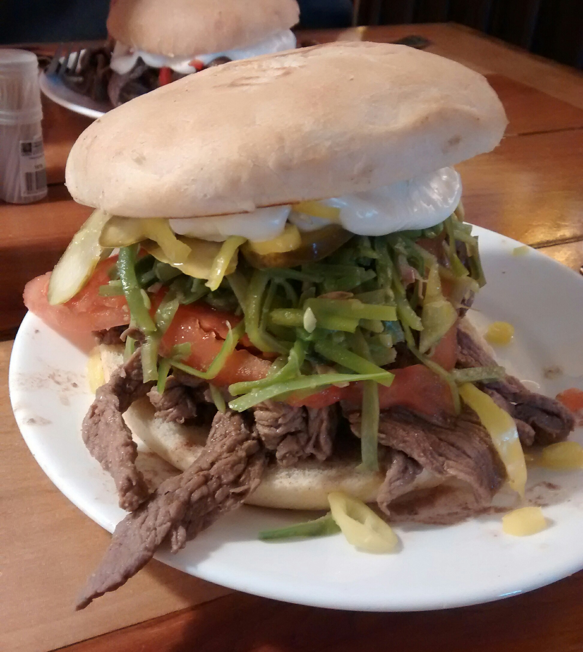 Sánguche típico de Chile llamado Chacarero. Compuesto por carne de vacuno, tomate, porotos verdes y ají. En varios locales, como la Fuente Mardoqueo o Dominó, la mayonesa no va incluida, por lo que se tiene que pagar aparte.